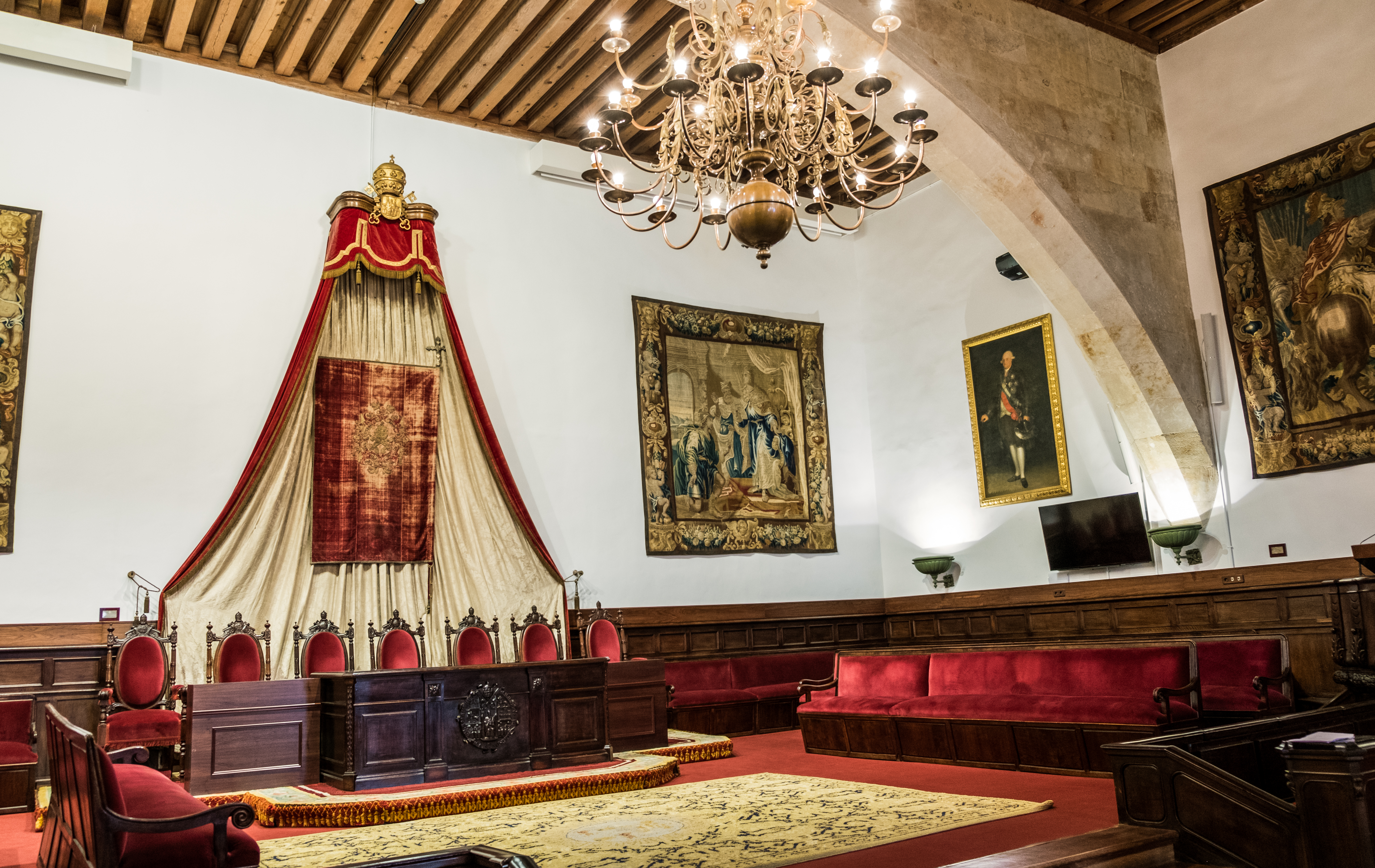 Paraninfo de la Universidad de Salamanca. Edificio de las Escuelas Mayores.